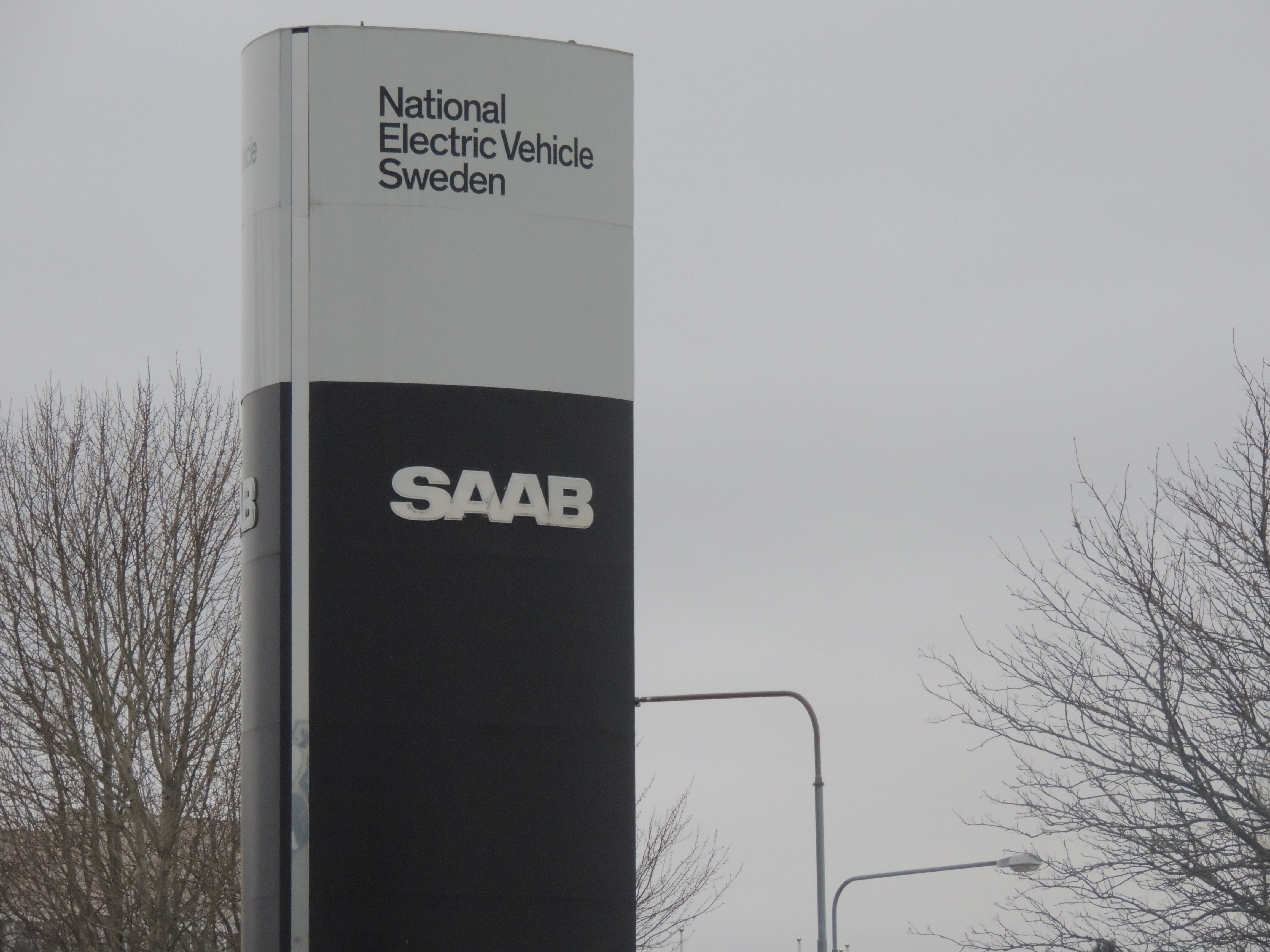 Pylon Saab factory NEVS